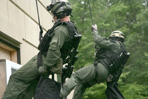 Zwei Agents des Hostage Rescue Team des FBI.